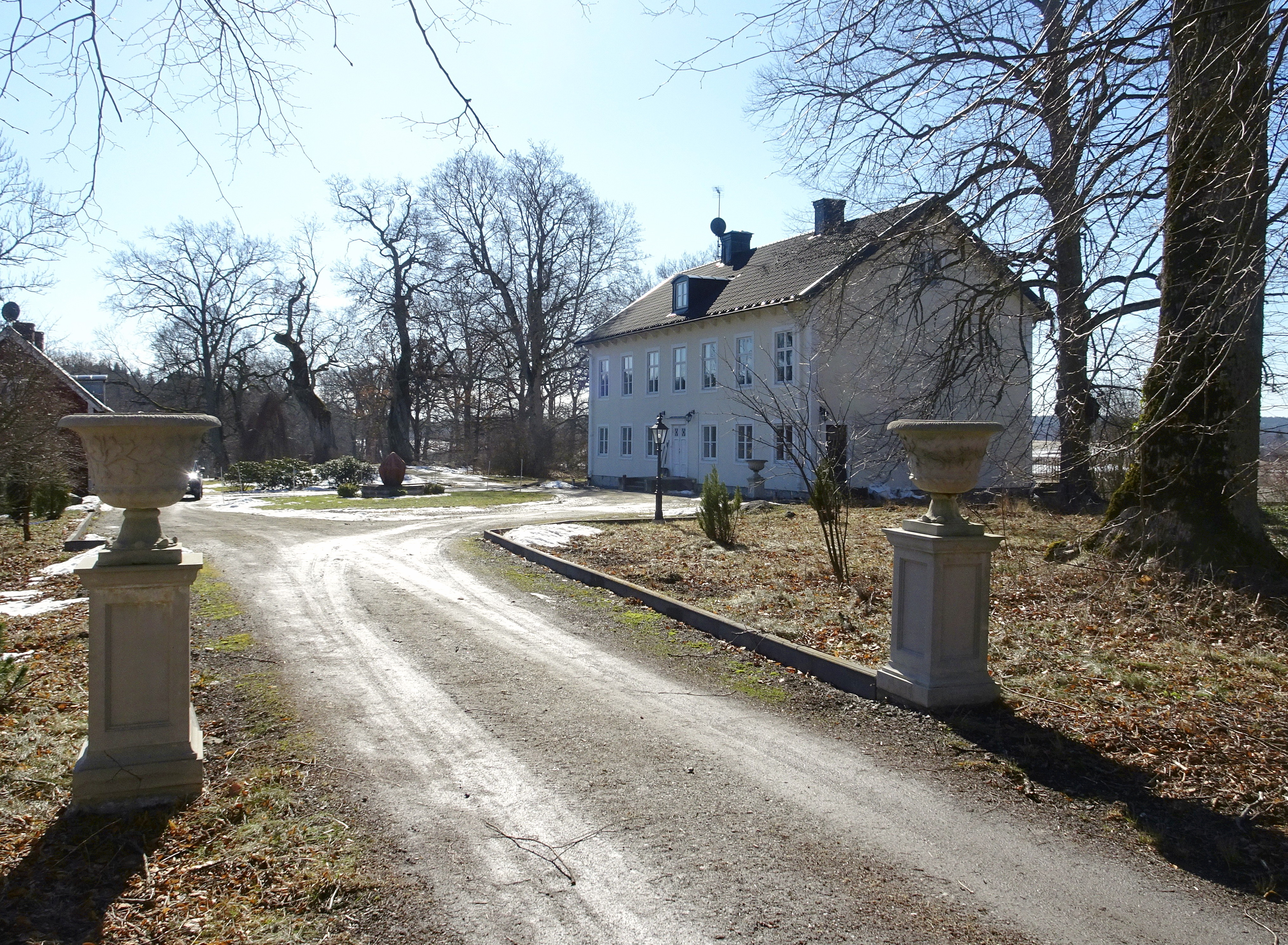 Vansta gård, Ösmo socken (huvudbyggnad)